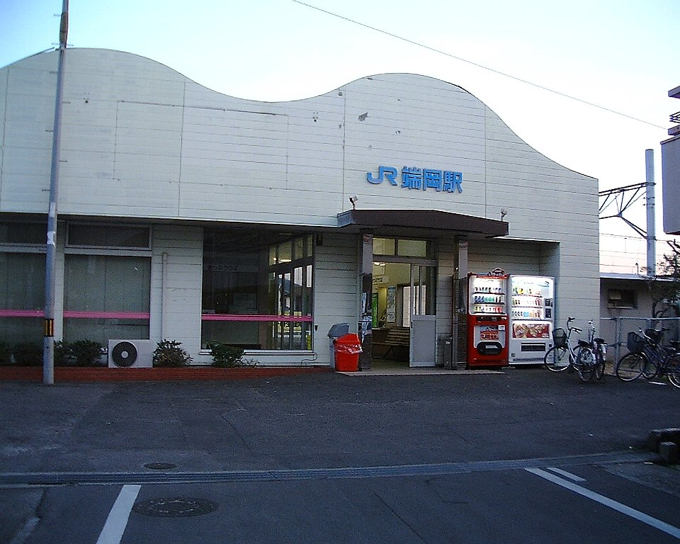 予讃線端岡駅 駅舎